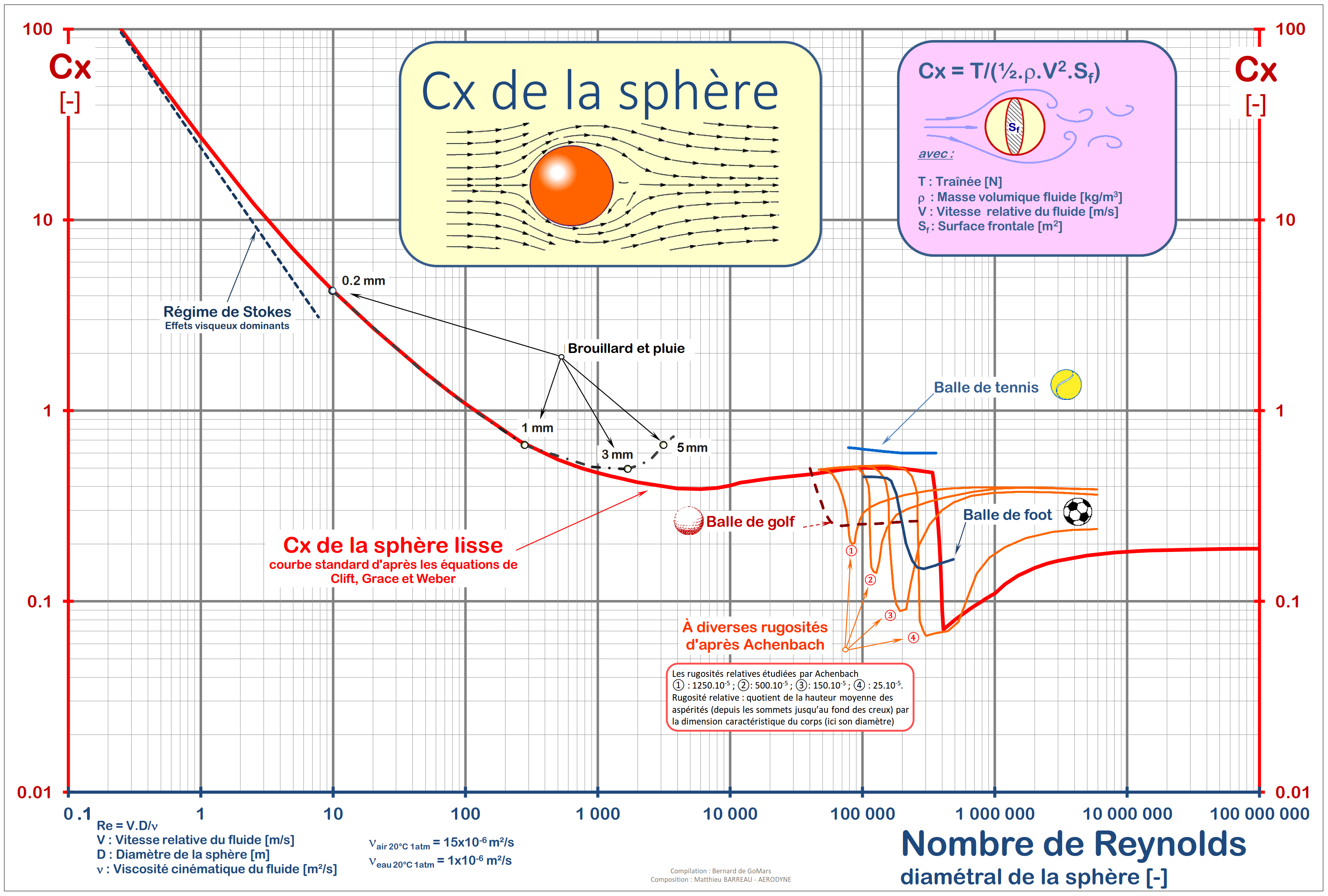 Cx de la sphère lisse selon son Reynolds diamétral ; Cx des balles de golf, de tennis et de football ; Cx des sphères rugueuses selon Achenbach ;Cx des gouttes de pluie et de brouillard selon leur diamètre équivalent. Définition du Cx.